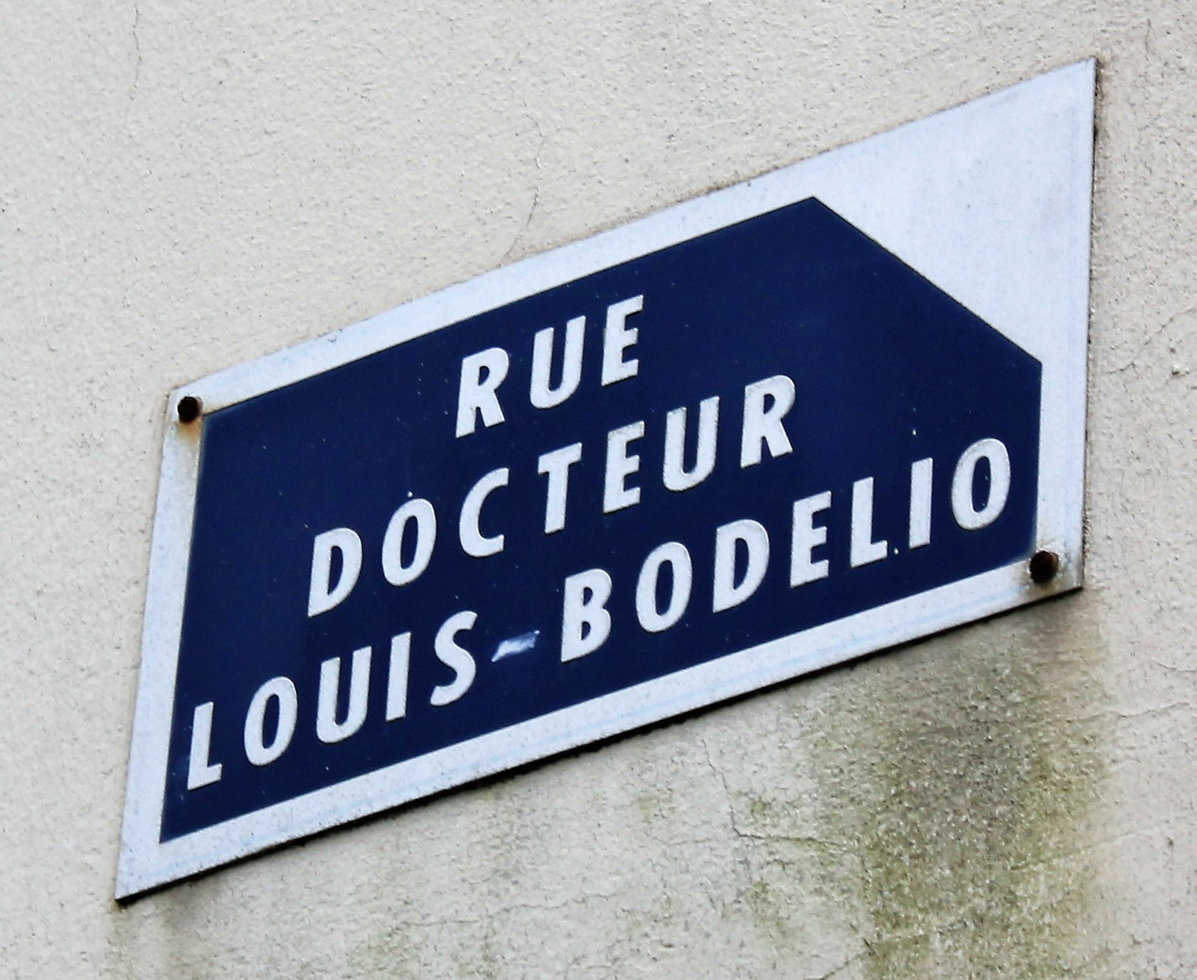 plaque de la rue Louis Bodelio à Lorient.